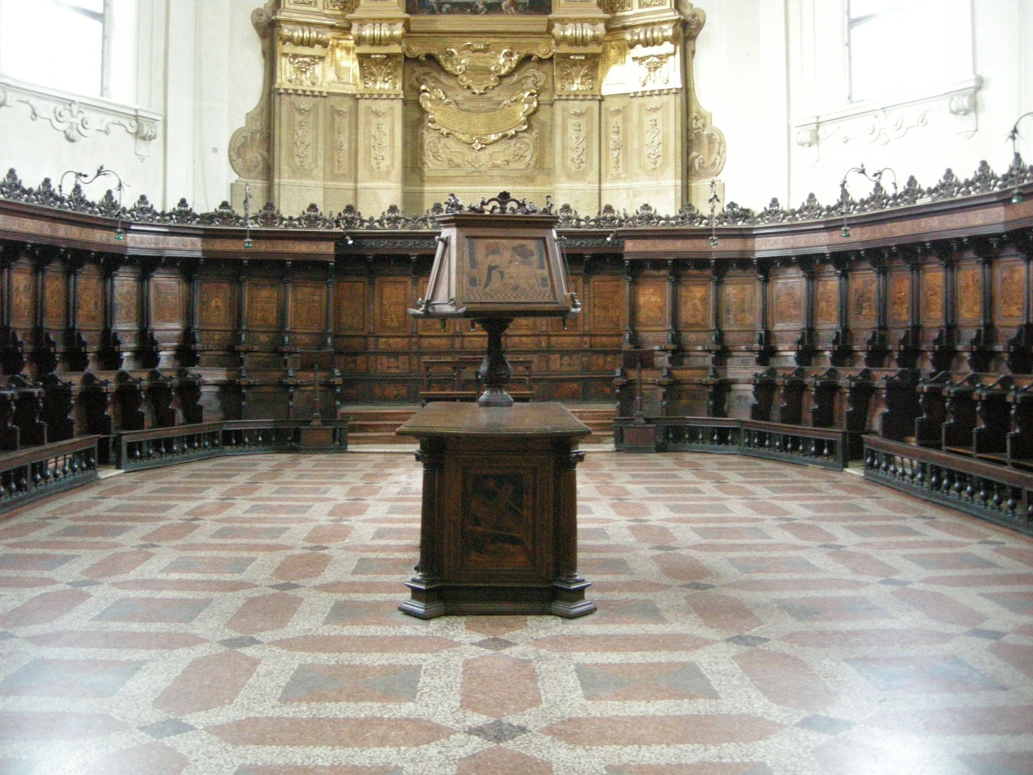 San domenico, bologna, coro di fra damiano da bergamo, 1541-49